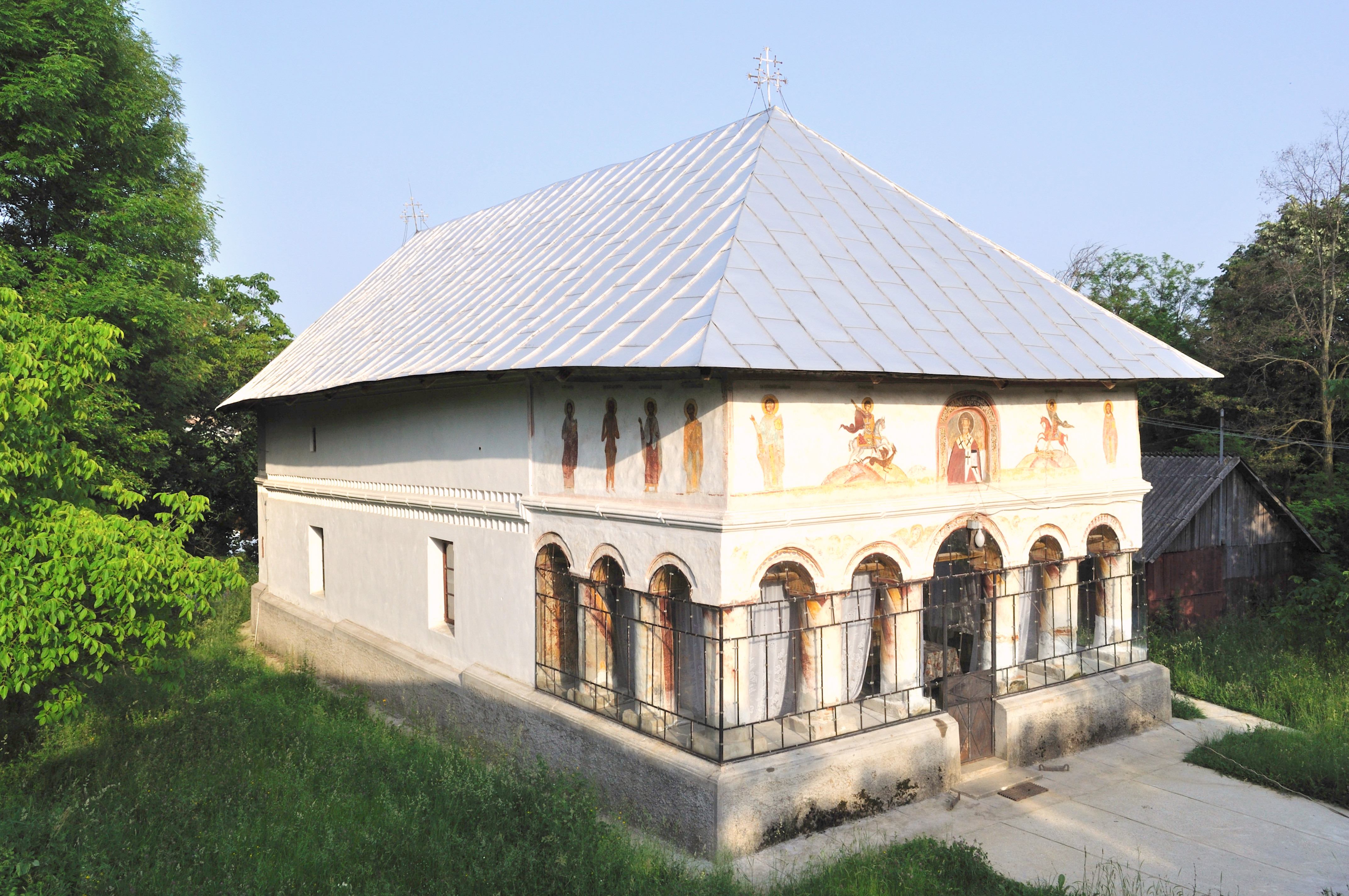 Biserica „Sfântul Nicolae” din satul Bărbătești, cătunul Vătășești, județul Vâlcea